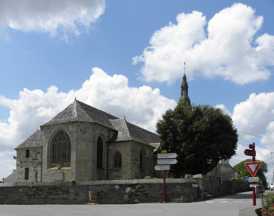 Église Sainte-Pitère du Tréhou (29). Chevet.